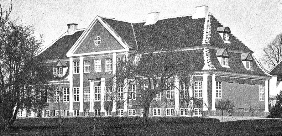 Hjortholm nævnes første gang som Fodslettegaard i 1509. Navnet Hjortholm er fra 1601 og gården er nu en hovedgård. Gården ligger i Fodslette Sogn, Langelands Sønder Herred, Sydlangeland Kommune. Hovedbygningen er opført i 1789.